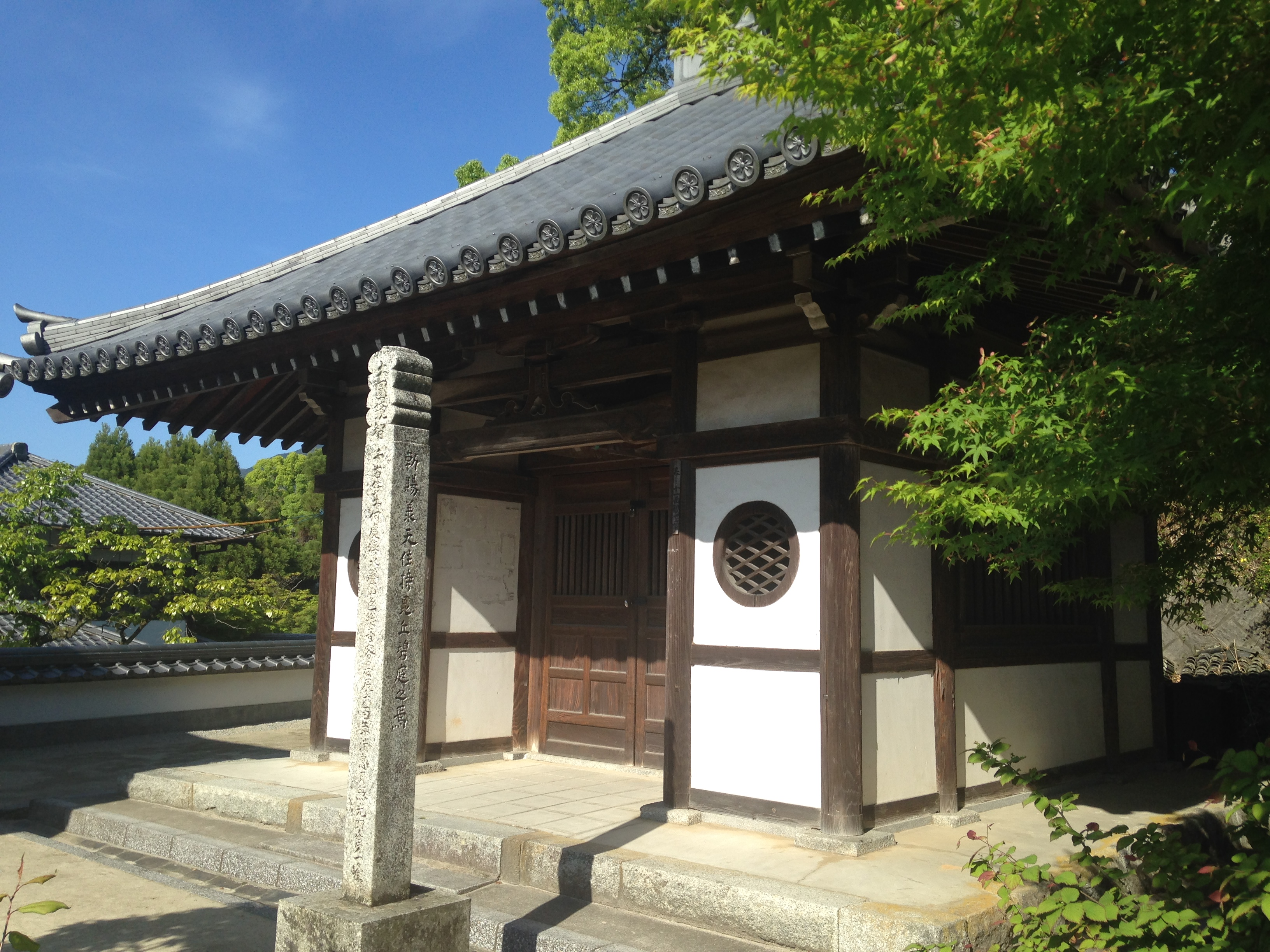 光明禅寺・観音堂